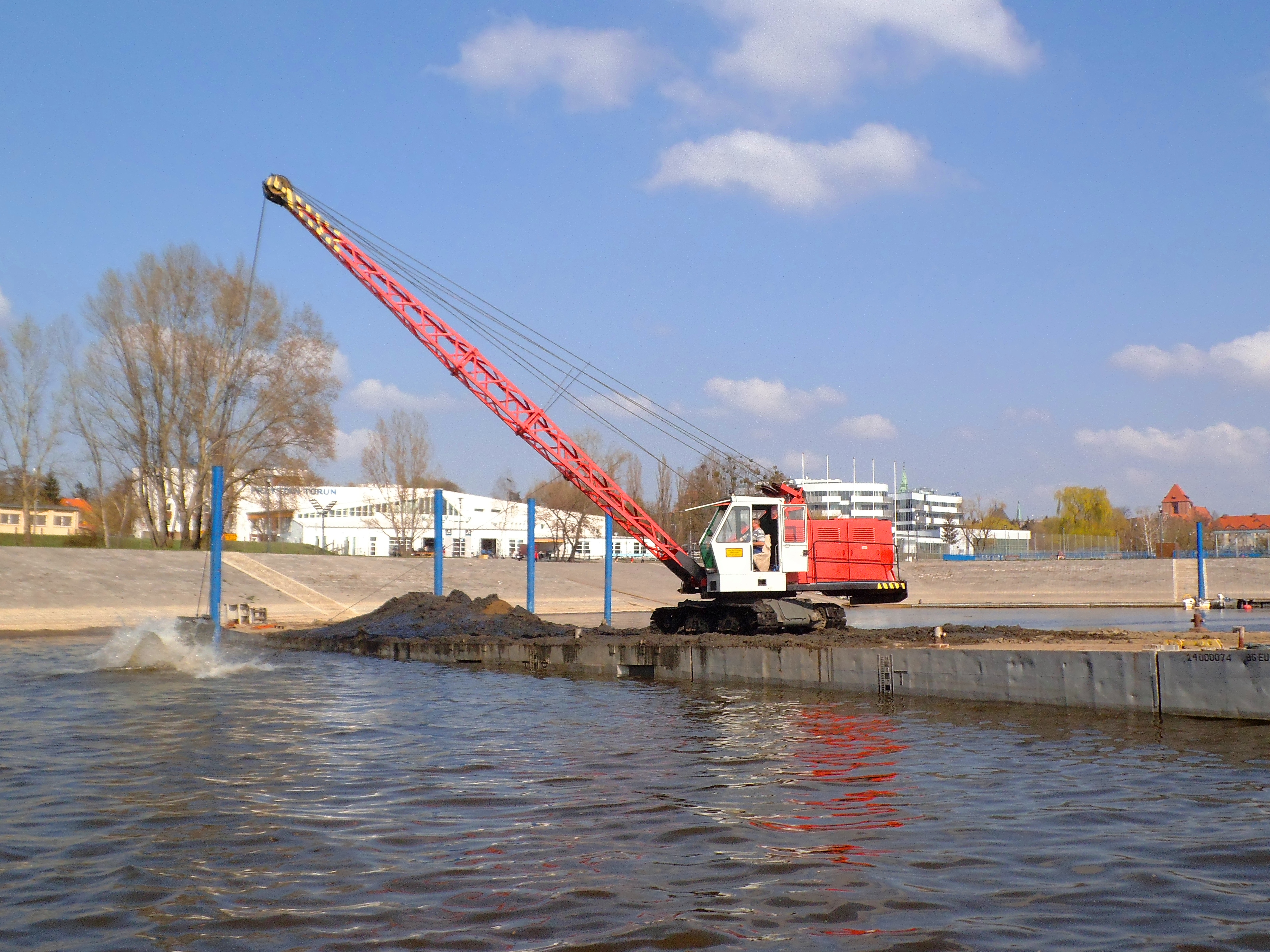 Przystań AZS w Toruniu, wiosna 2017